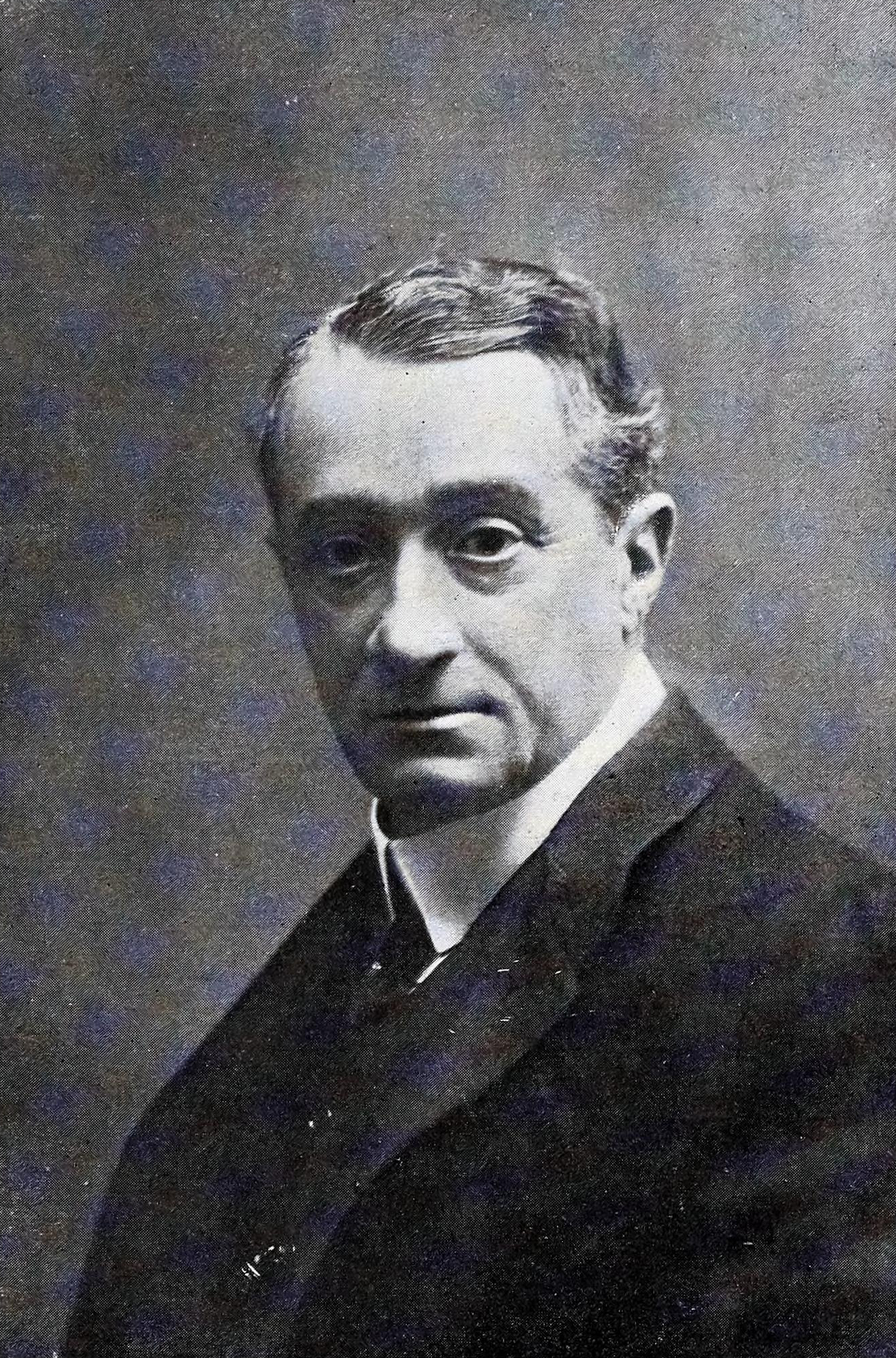 José del Perojo y Figueras.